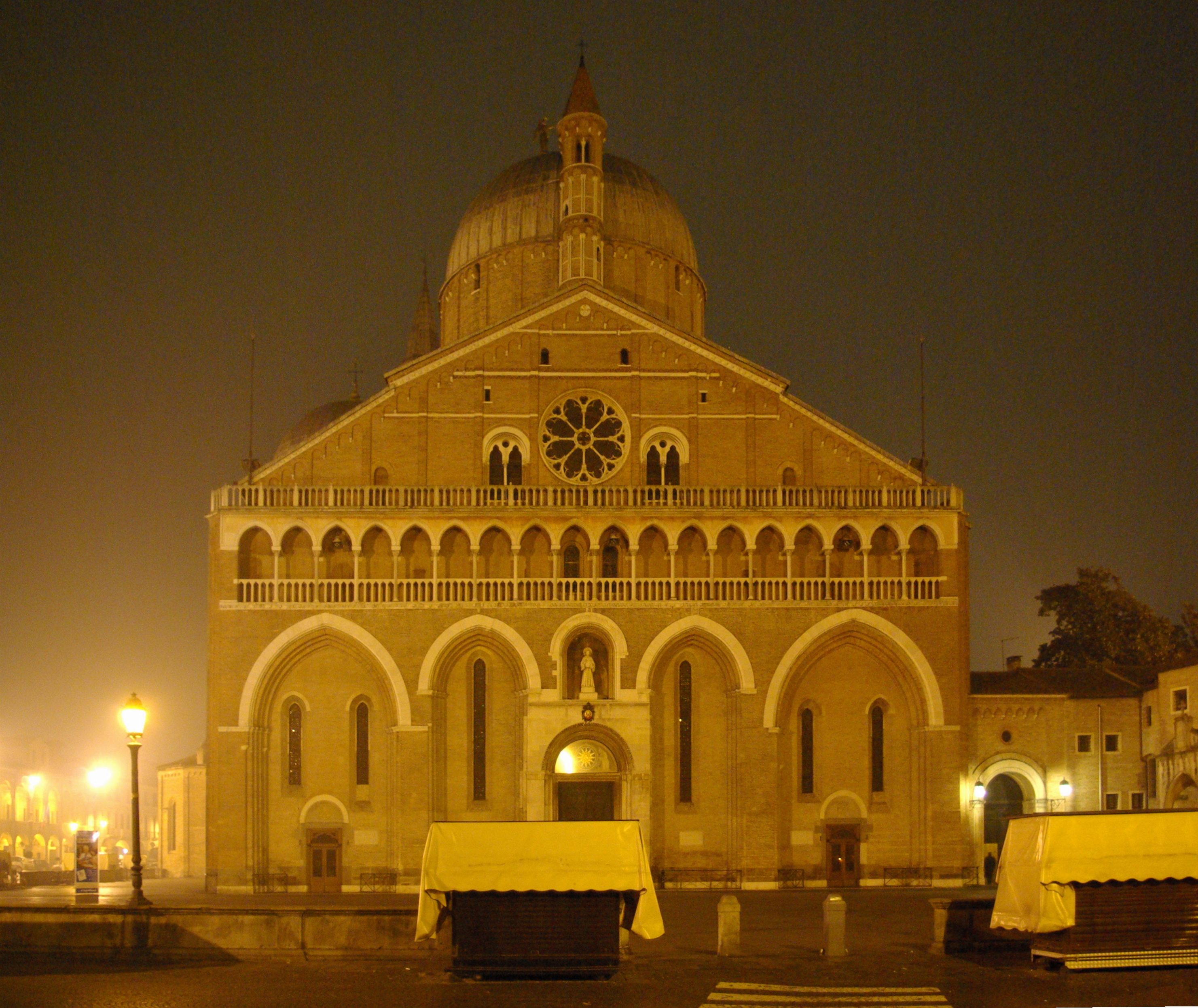 Basilica di Sant'Antonio da Padova